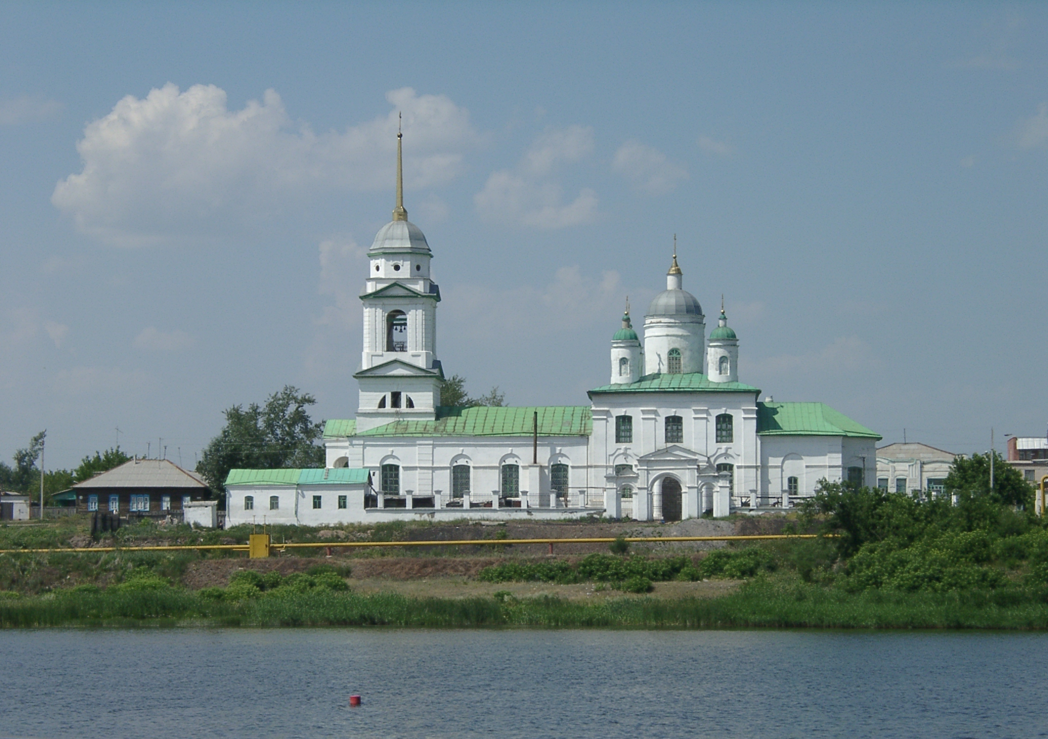 Троицк, угол улиц Красногвардейской и Володарского Built: неизвестно Approved: решение облисполкома № 154 от 30.03.1971